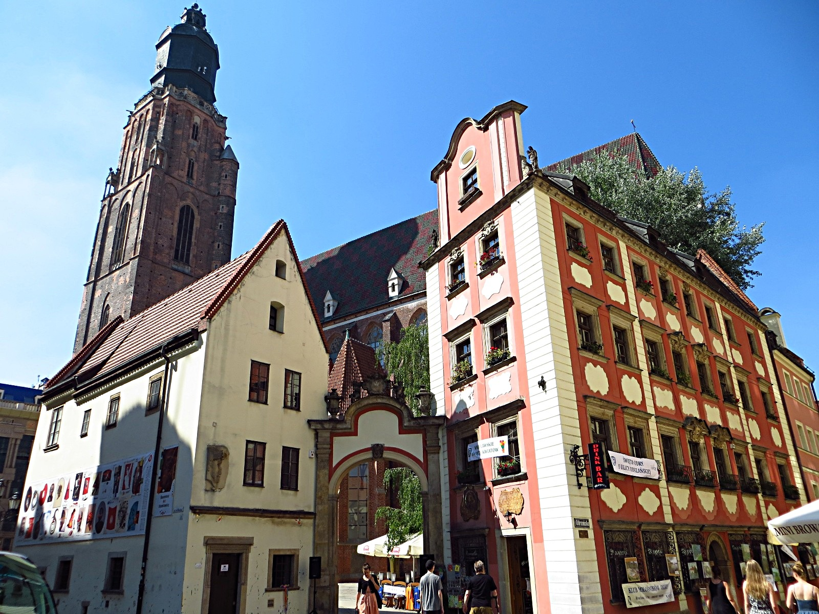 Jaś i Małgosia